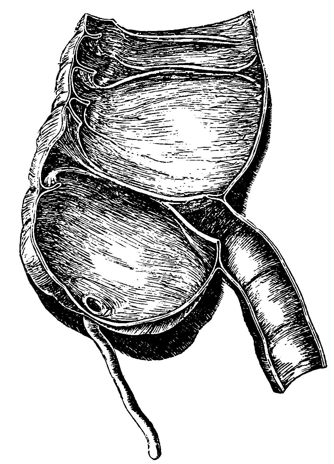 Intestino: sección al nivel del íleon y el ciego; también se ve el apéndice vermicular.